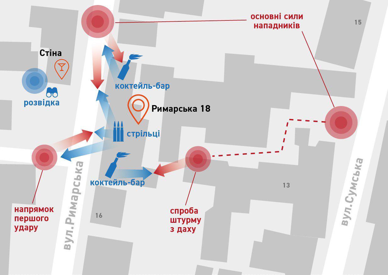 план-схема бою на вулиці Римарській у Харкові 14/15.03.2014 р.